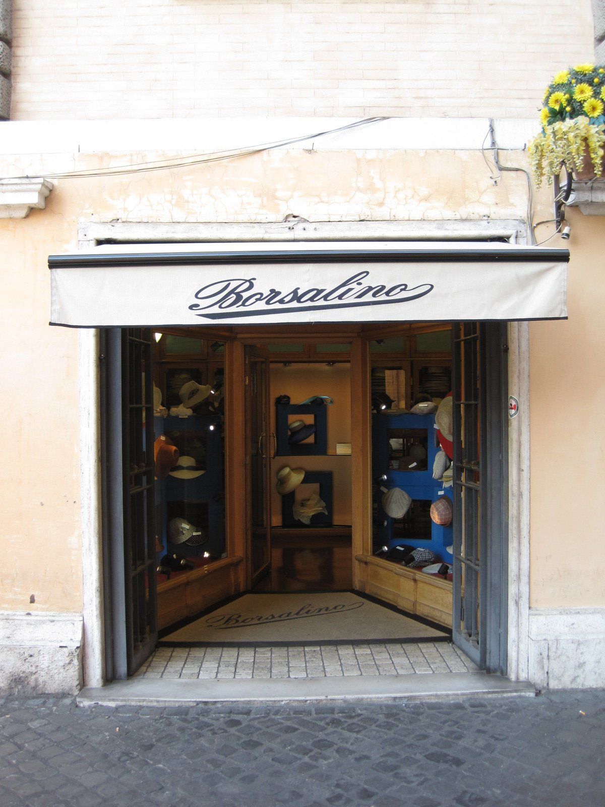 Boutique Borsalino à Rome